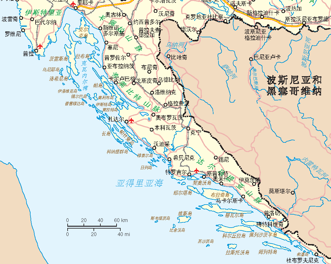 克罗地亚在亚得里亚海内的岛屿